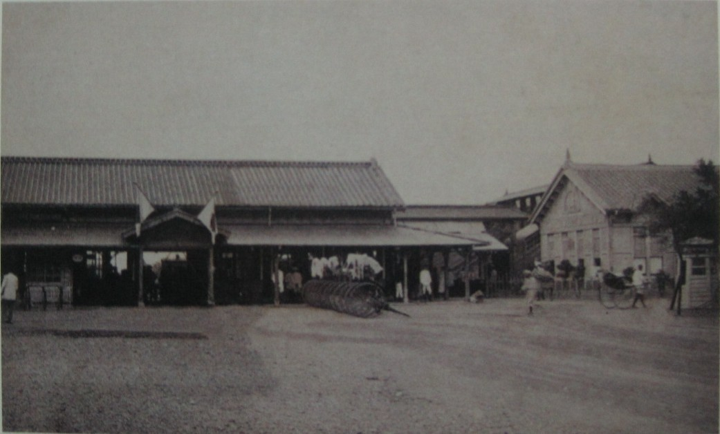 1933年改建前的嘉義驛